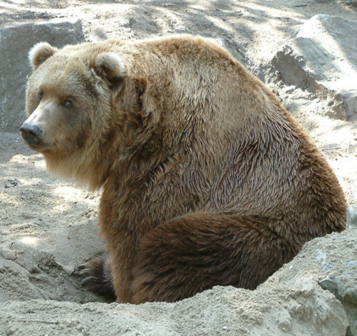 eigen foto noorderdierenpark emmen 2003